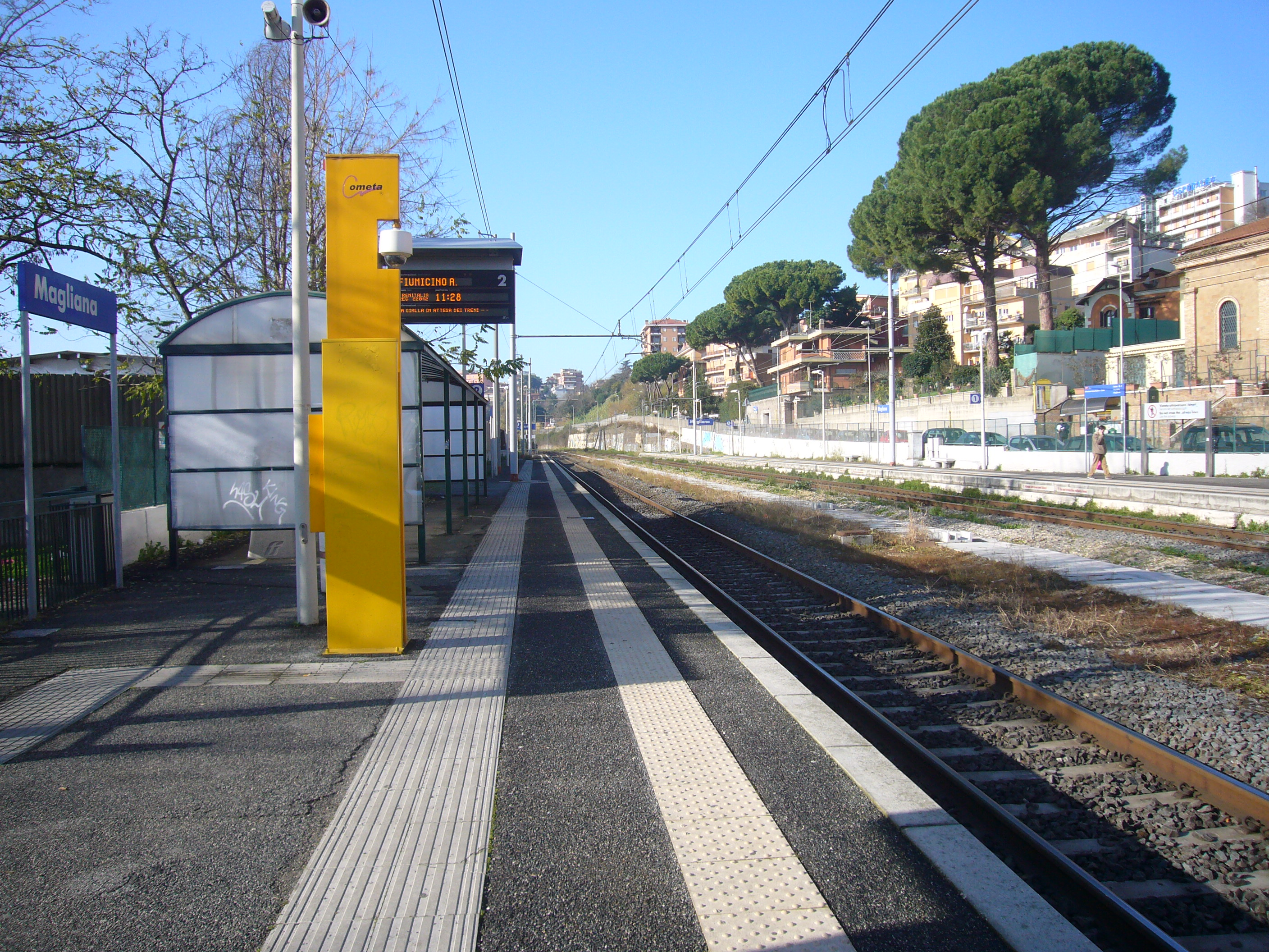 Roma, Stazione FS Magliana